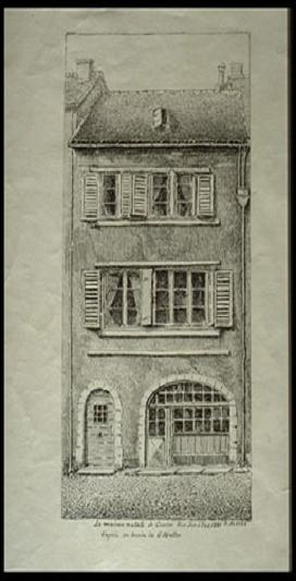 Das Geburtshaus von Georges Cuvier (1769-1832)